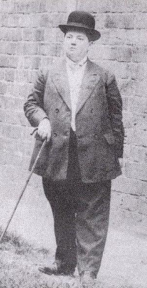 Madeleine Pelletier (18 mai 1874 - 19 décembre 1939) est une militante féministe et socialiste libertaire française. Elle fut la première femme médecin diplômée en psychiatrie en France.